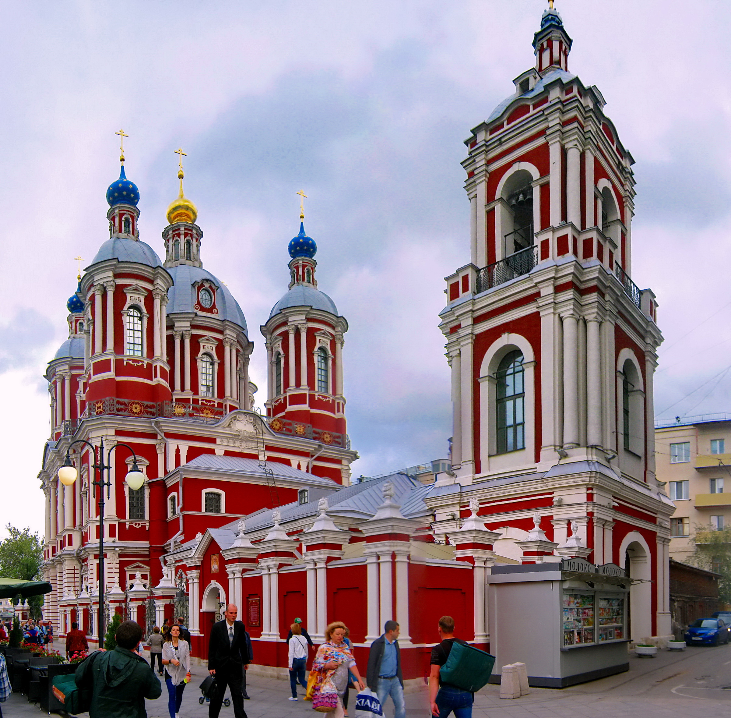 Церковь священномученика Климента, папы Римского (Спаса Преображения) (Москва и Московская область, Москва, Пятницкая улица, 26 строение 1; Климентовский переулок, 7)